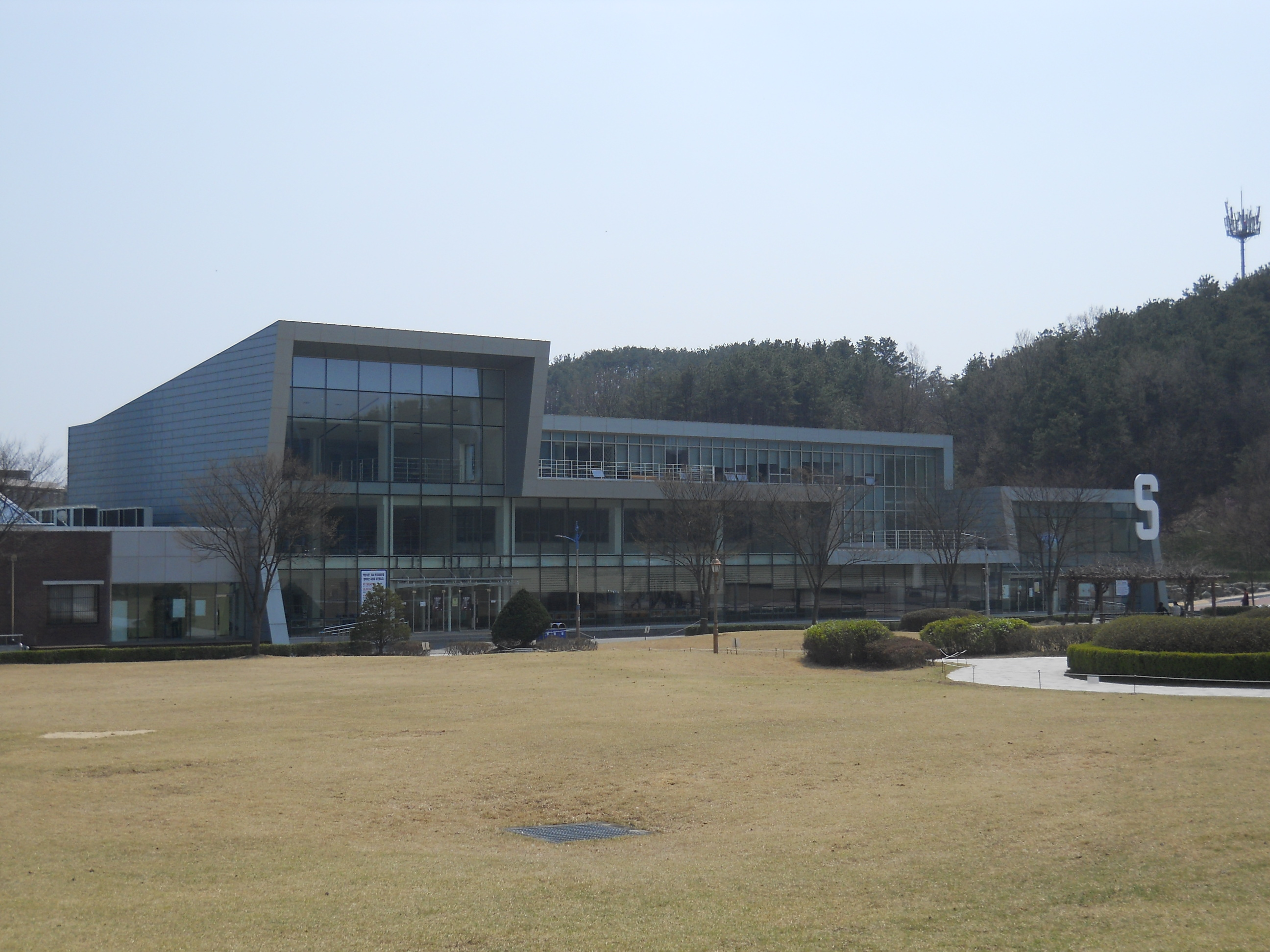 2015년 4월 텔레토비 동산에서 바라본 학생회관